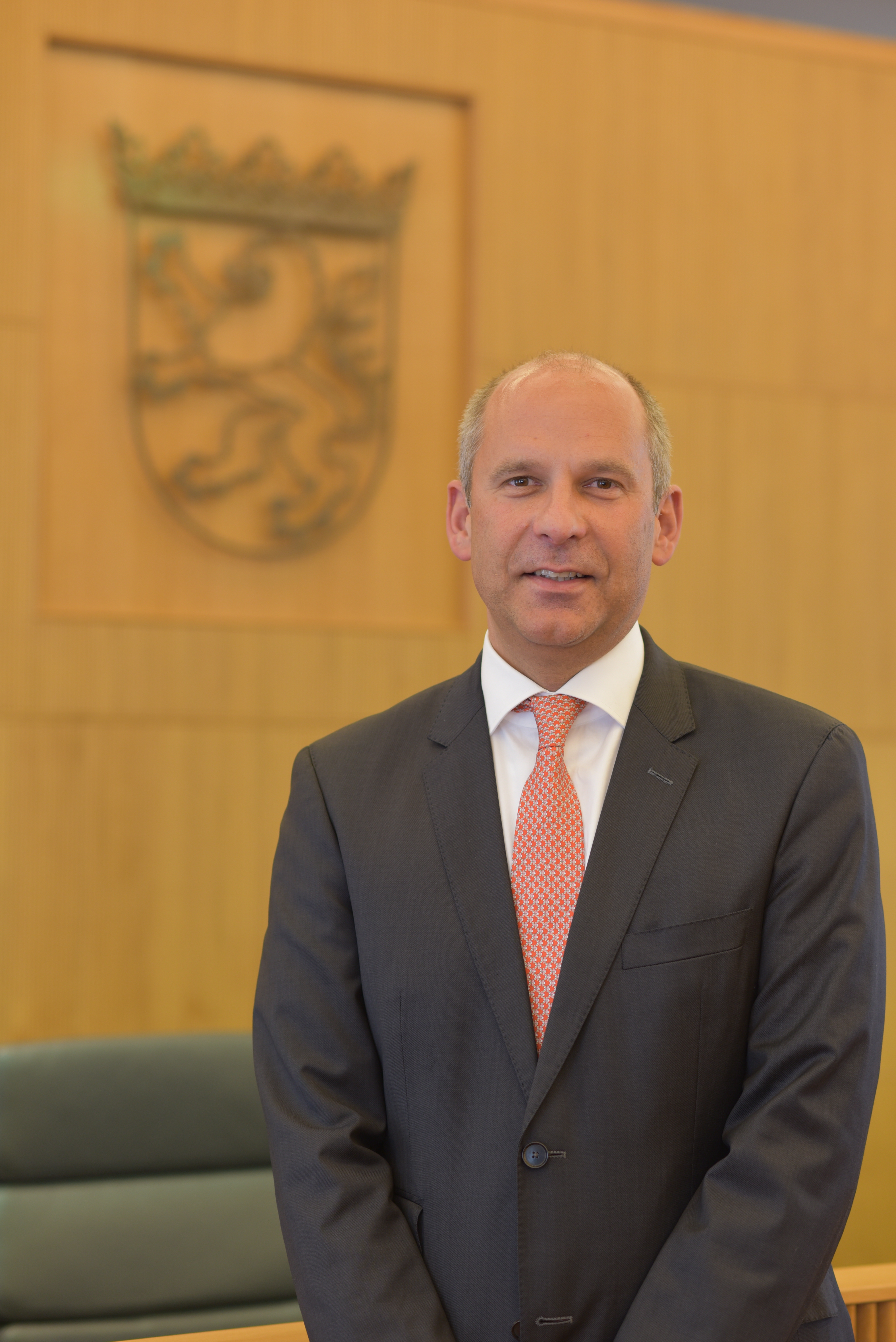 Portrait